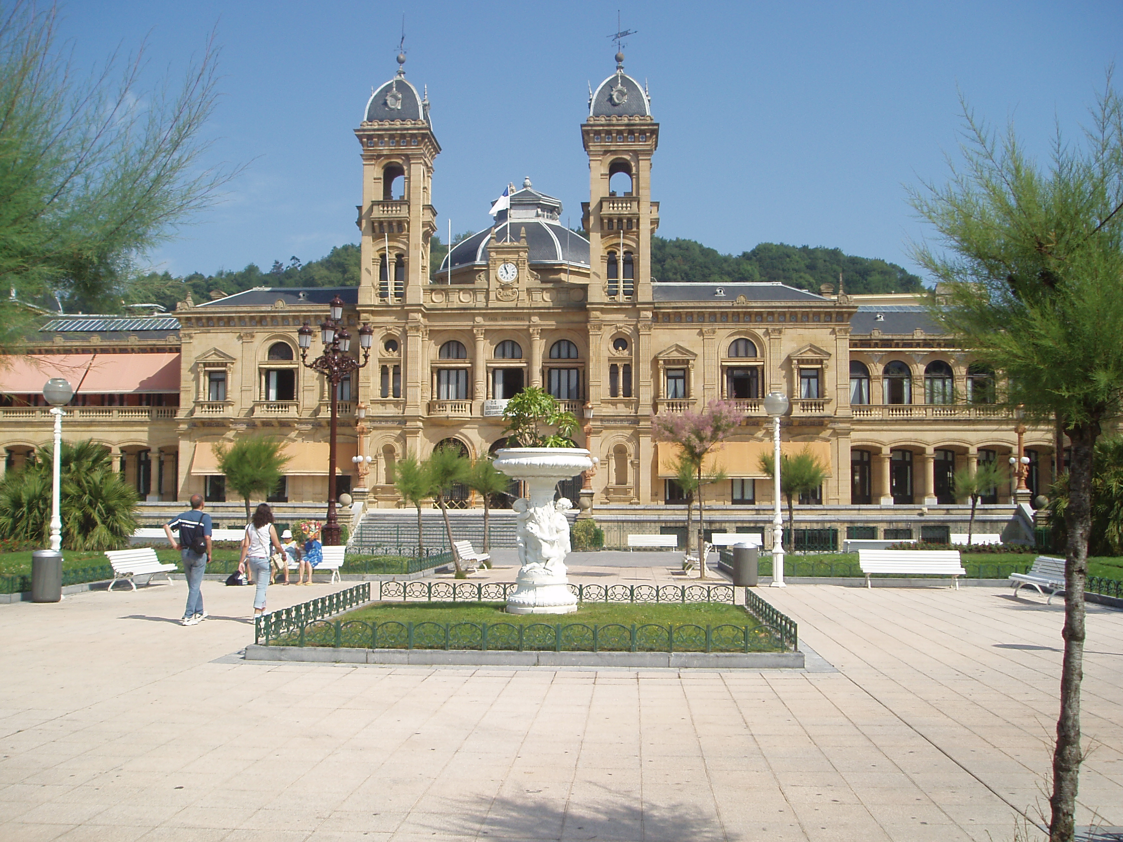 "Vista del Ayuntamiento de San Sebastian(Guipúzcoa)."